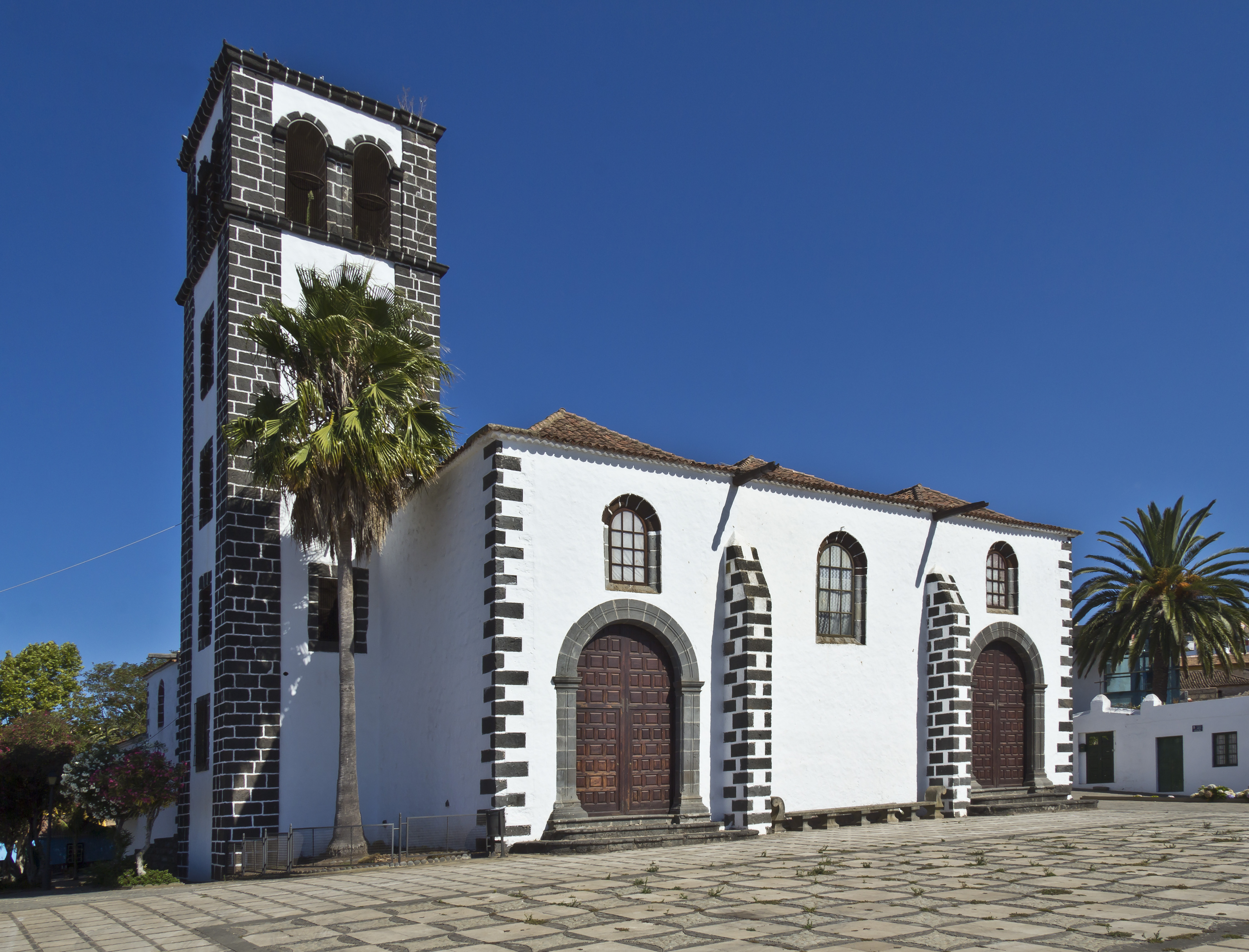 Westfassade der Kirche Santa Catalina in Tacoronte (Canarias)